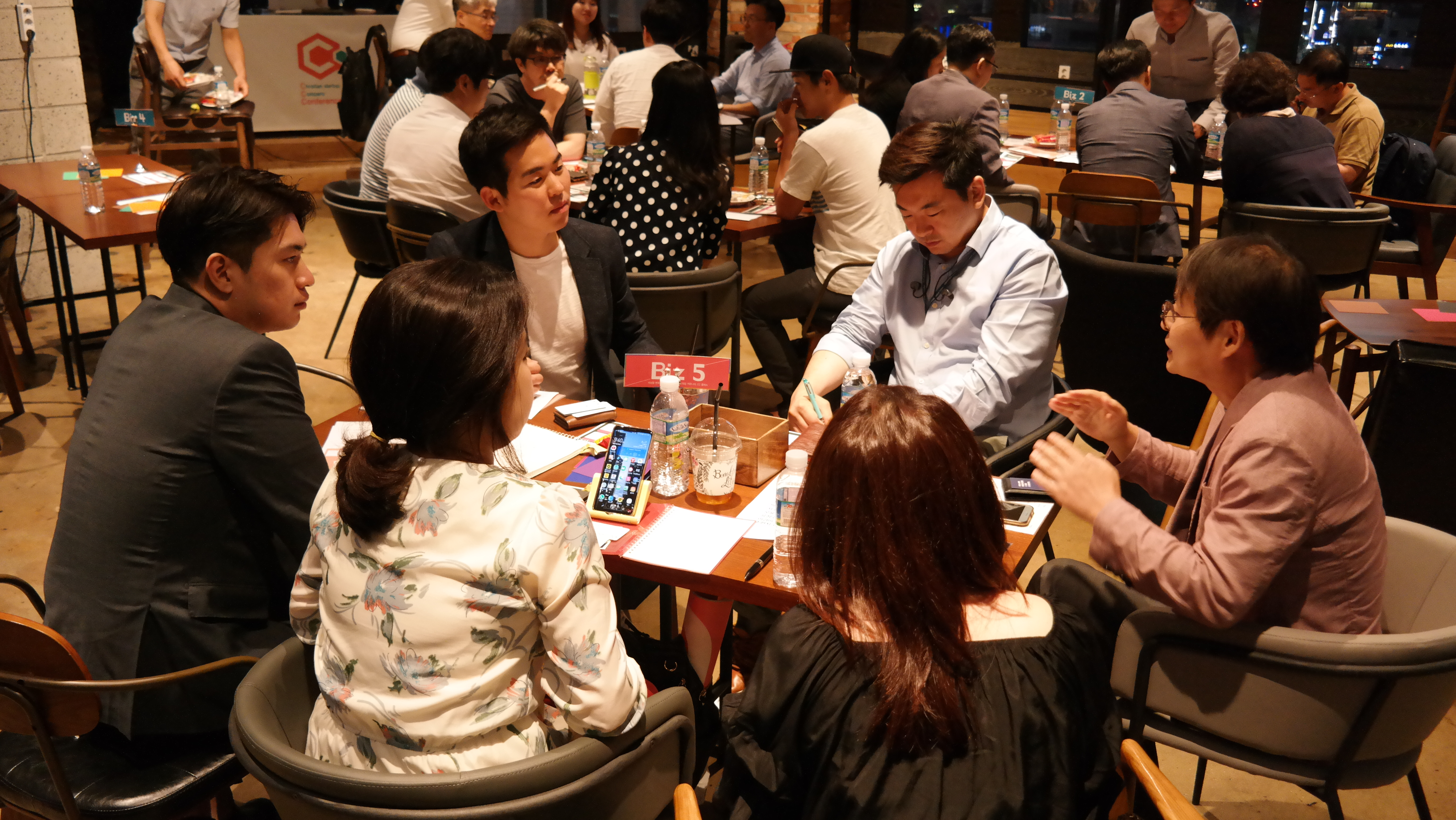 CC클래스 비즈별 나눔 시간인 비즈토크를 진행하고 있는 회원들의 모습이다.